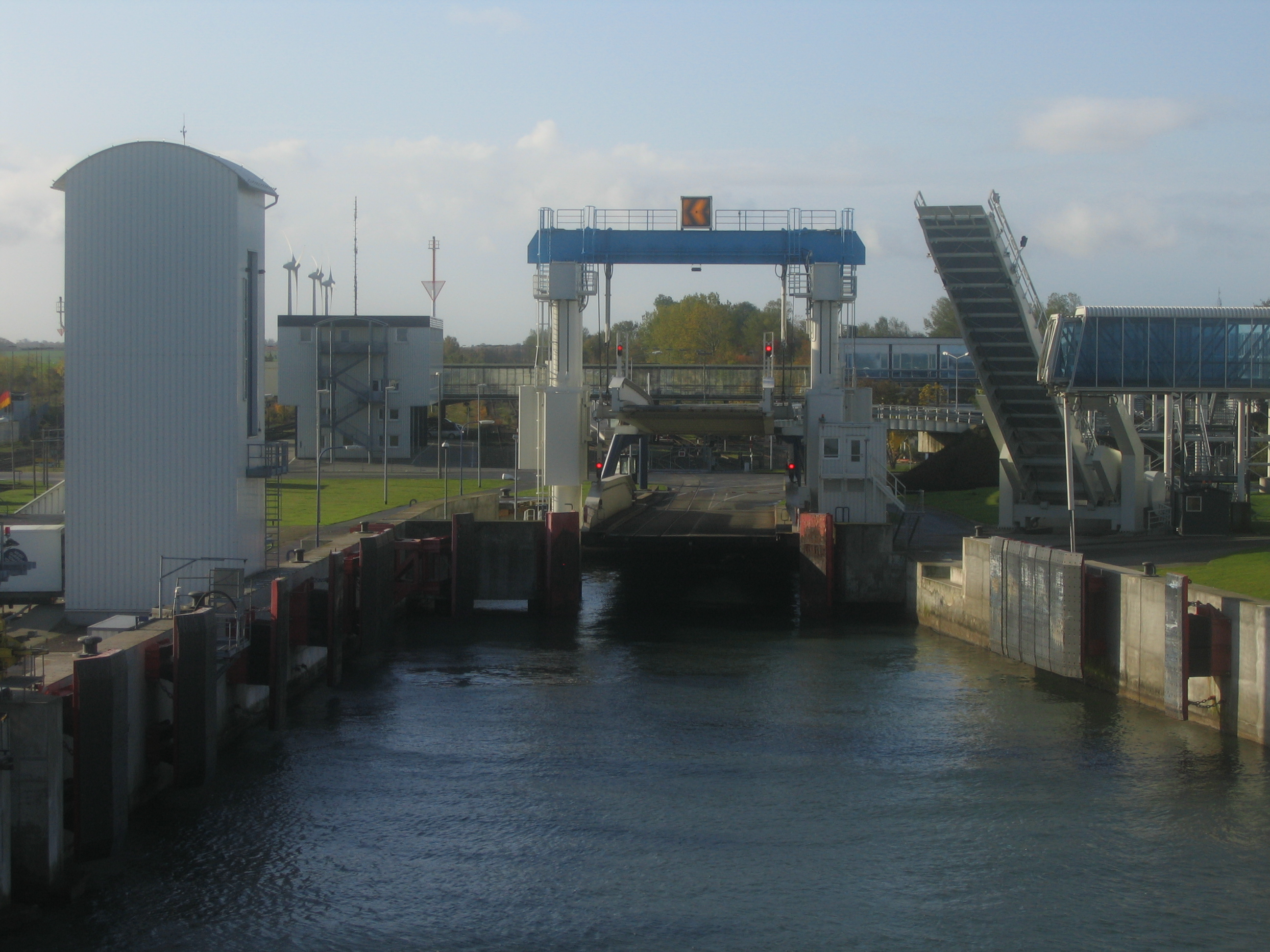 Fährbecken im Hafen von Puttgarden, gesehen von der FS Deutschland durch die Fensterscheibe.